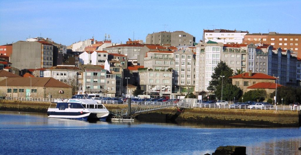 Muelle de Corbaceiras en Pontevedra capital